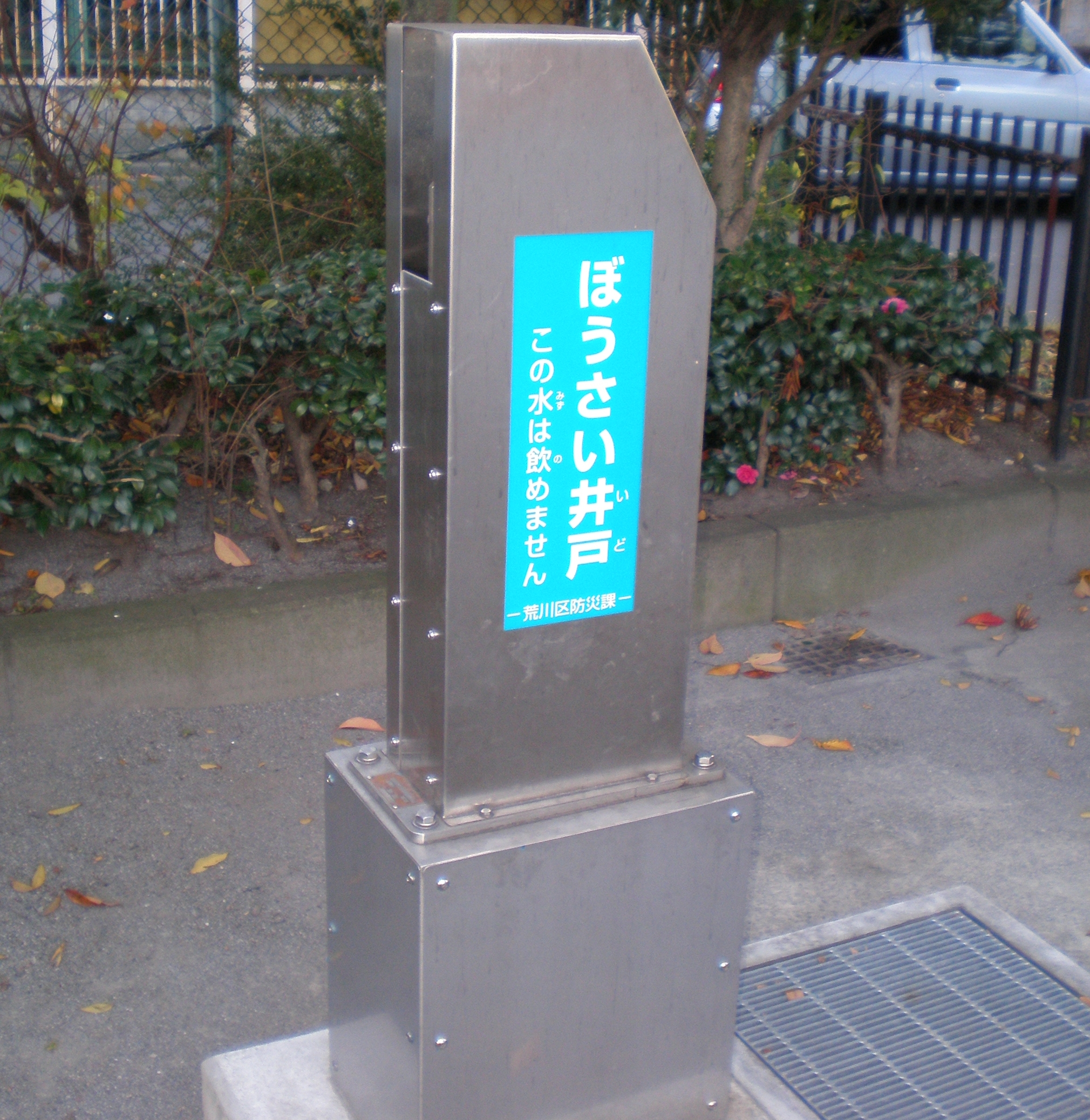 Disaster Water Well in Arakawa-ku Tokyo.